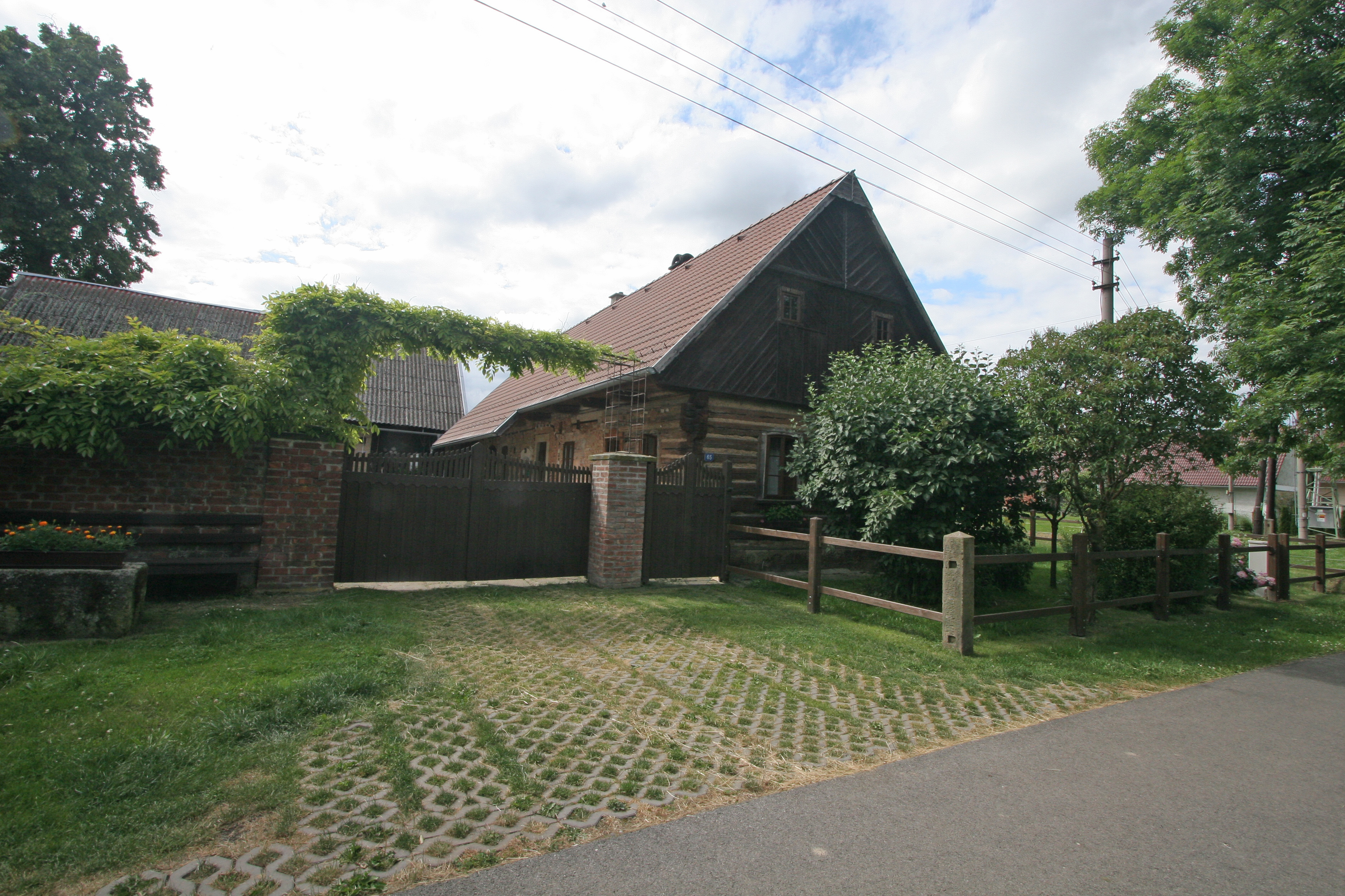 Malý Libotov čp 65